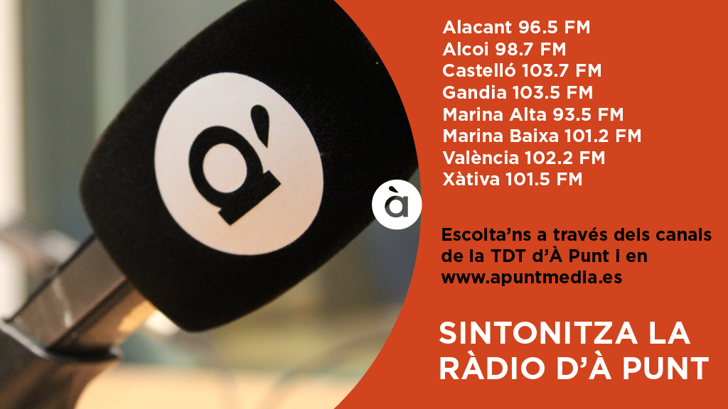 freqüències à punt mèdia ràdio